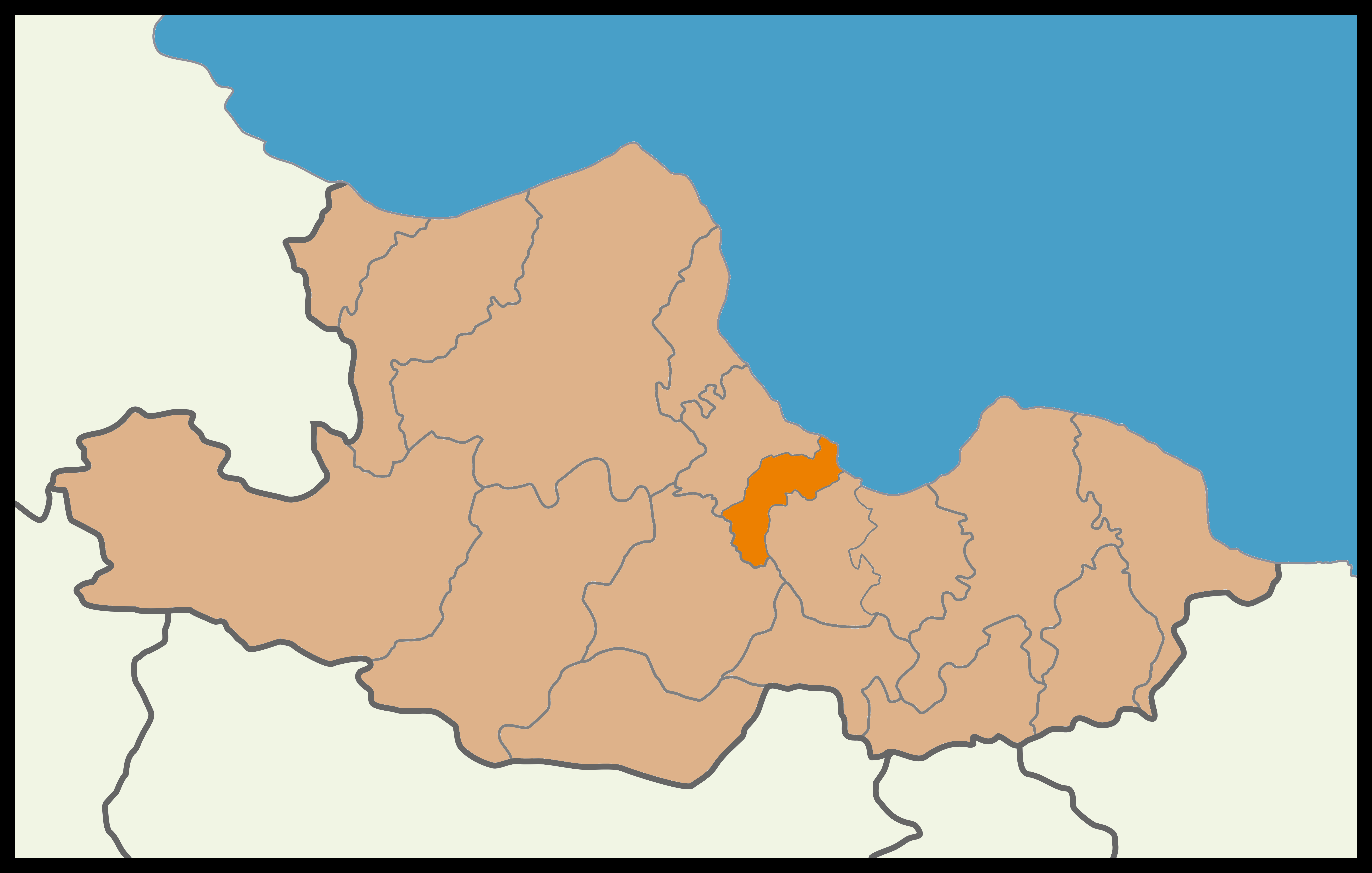 Samsun'un İlkadım ilçesinin 2015 Türkiye genel seçimleri haritası.